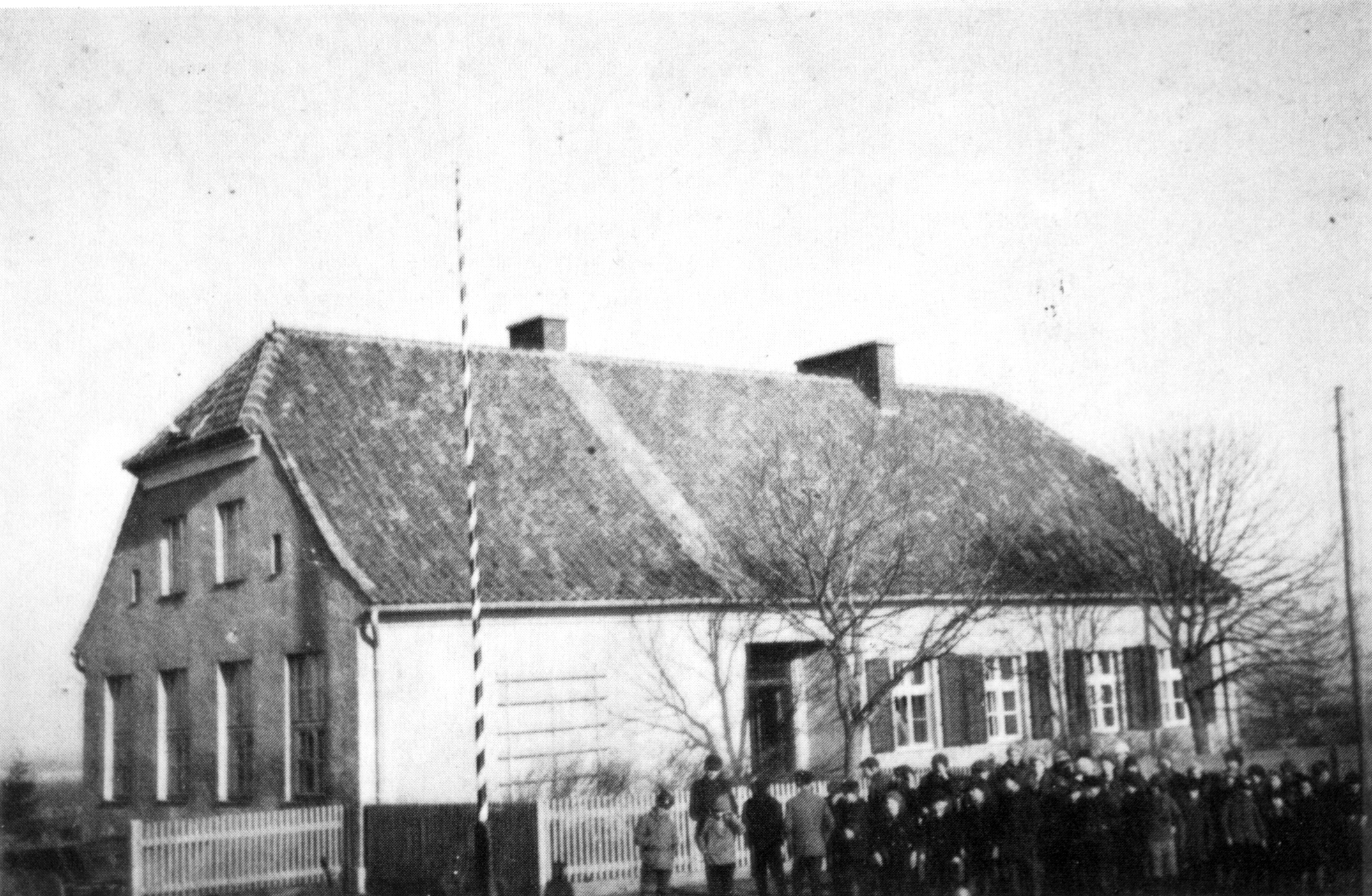 budynek szkoły w Wandajnach (1937 rok)